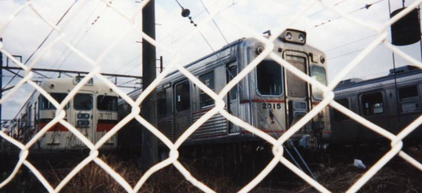 廃車後、東二見車庫で保管されていた山陽電気鉄道2000系電車タイプV（中央と左。中央の先頭車は現在では解体済）。